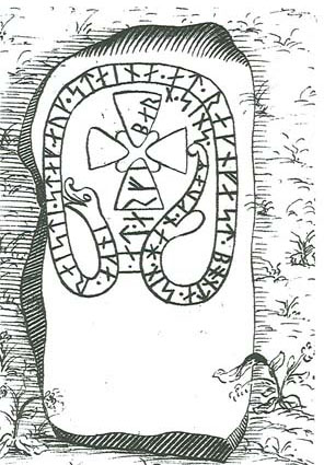 Runstenen U 332 (nu försvunnen) i Vreta i Markims socken, Vallentuna kommun.